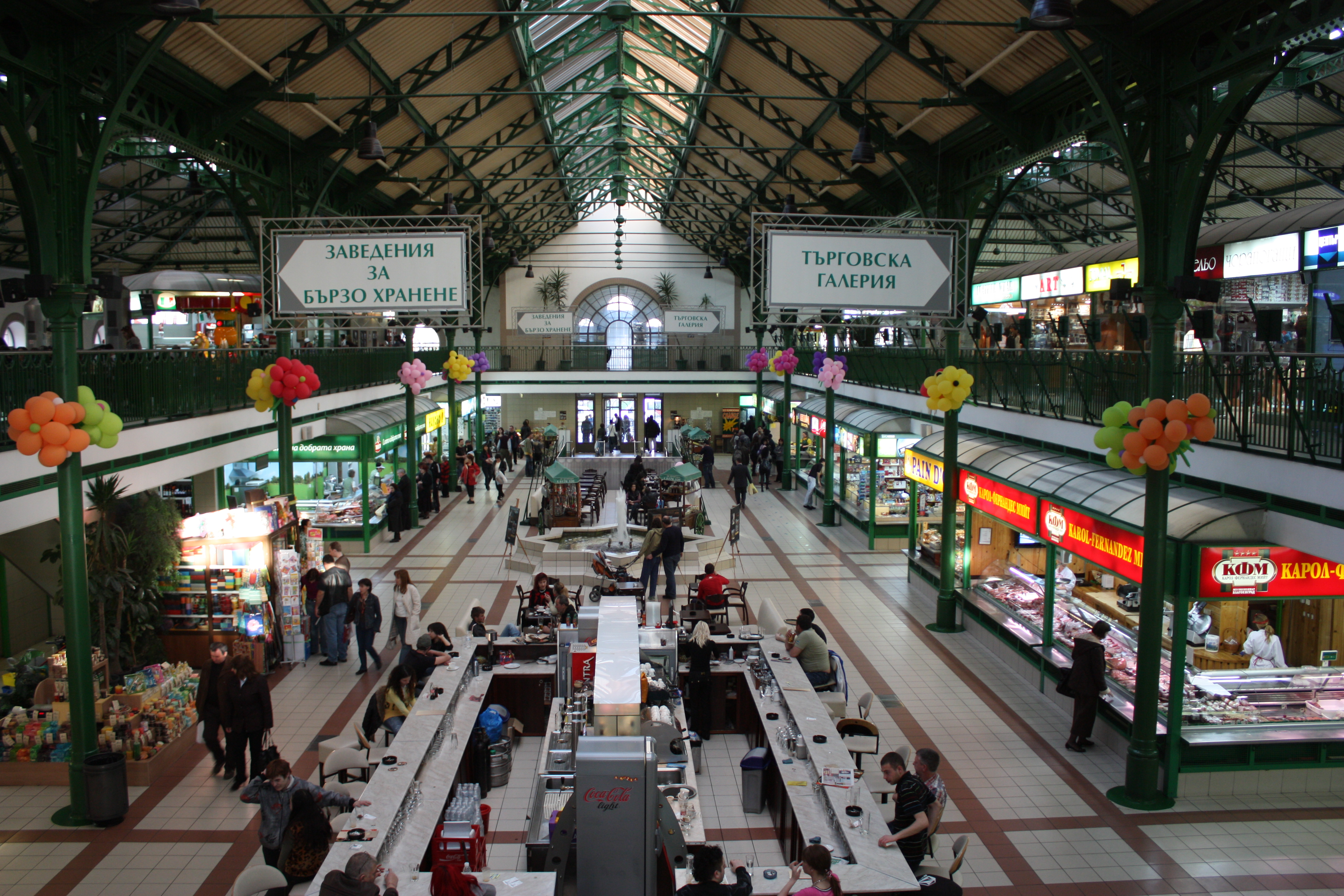 Central Sofia Market Hall, Zentralmarkthalle Sofia, Централни софийски хали